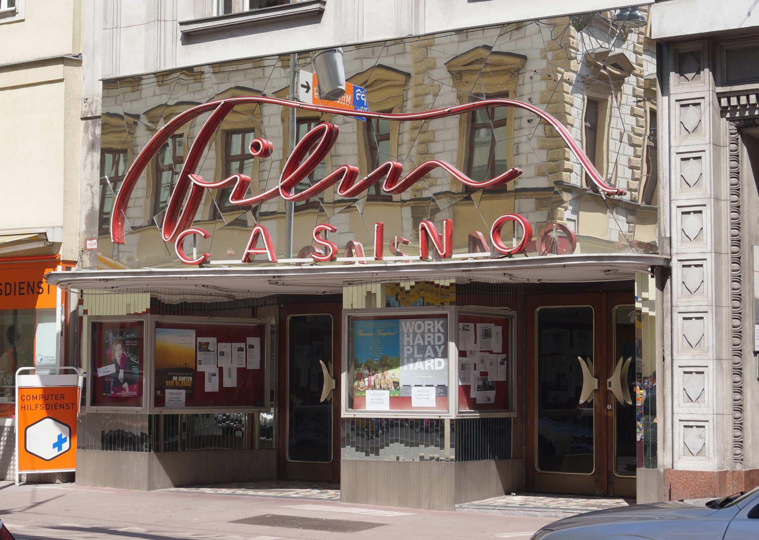 Außenansicht Filmcasino (Margaretenstraße 78 im 5. Wiener Gemeindebezirk)